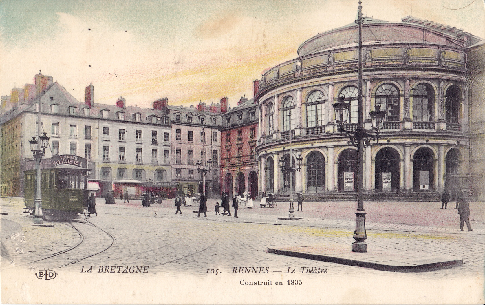 Carte postale ancienne éditée par ELD, n°105 :RENNES - Le Théâtre, construit en 1835.